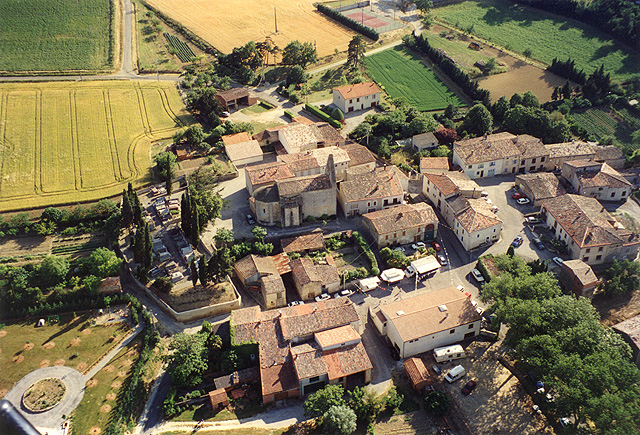 Baraigne vue du centre du village